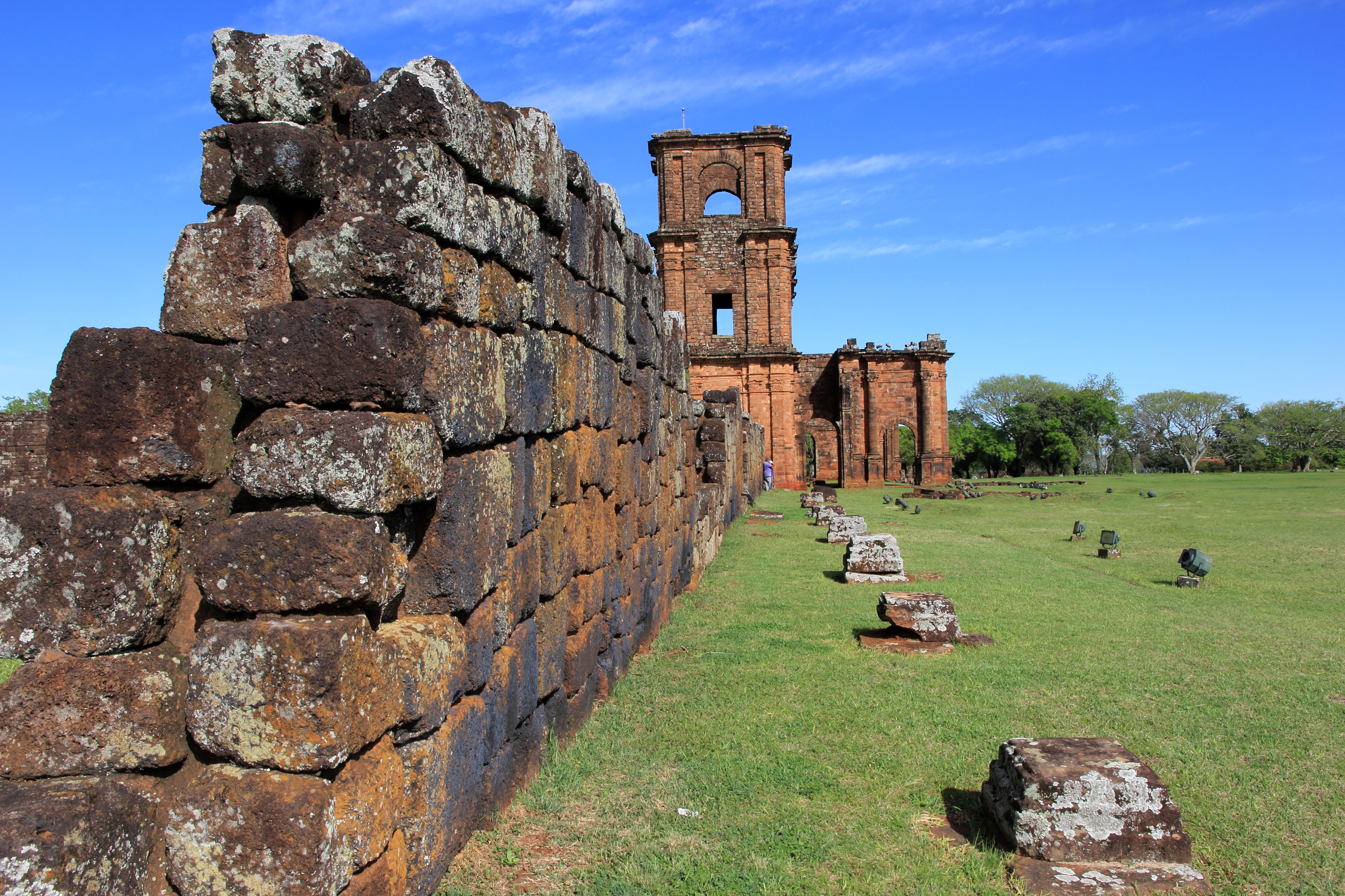 Sítio Arqueológico de São Miguel Arcanjo em São Miguel das Missões, RS.